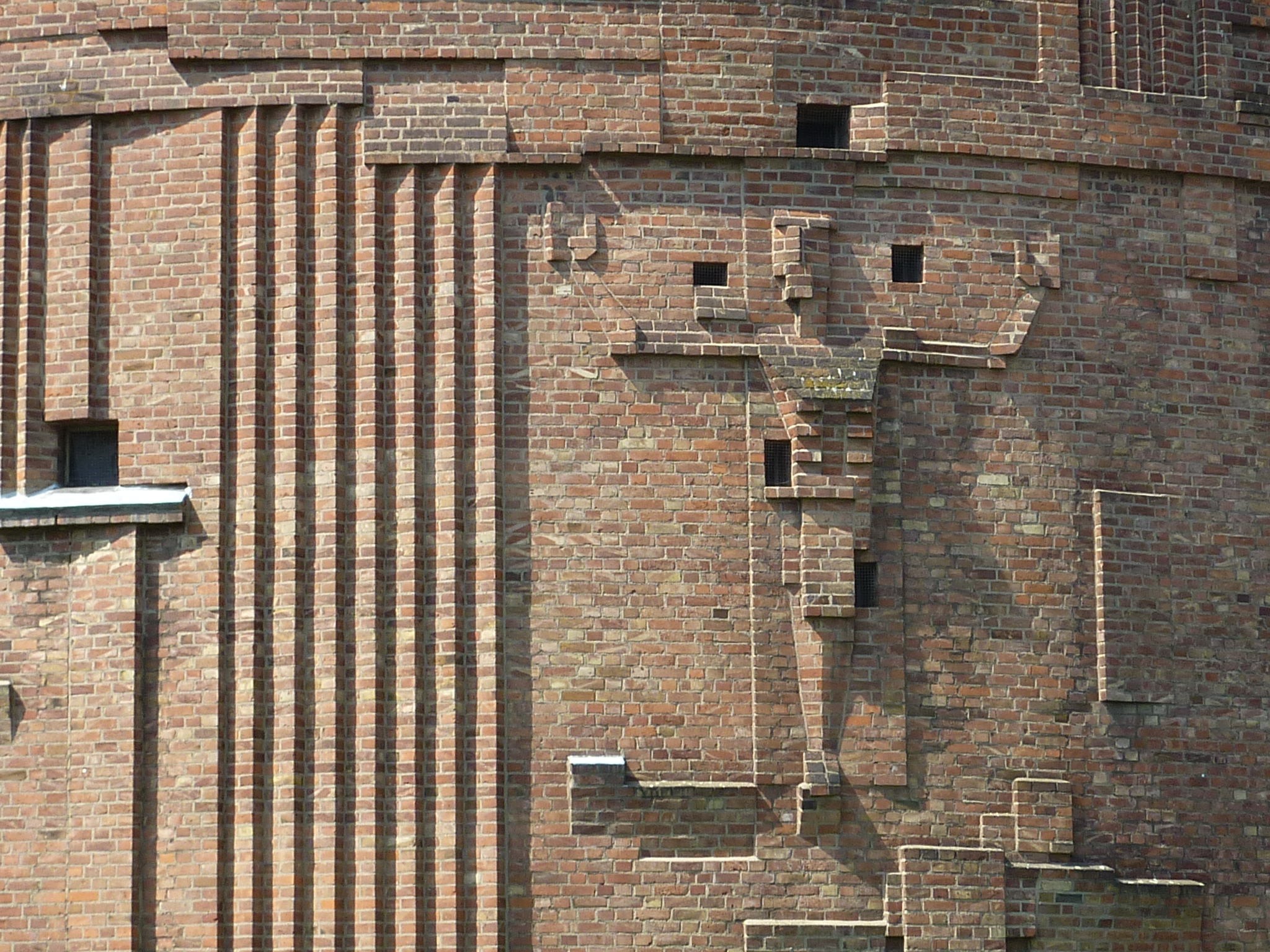 St. Franziskus (Köln-Bilderstöckchen)